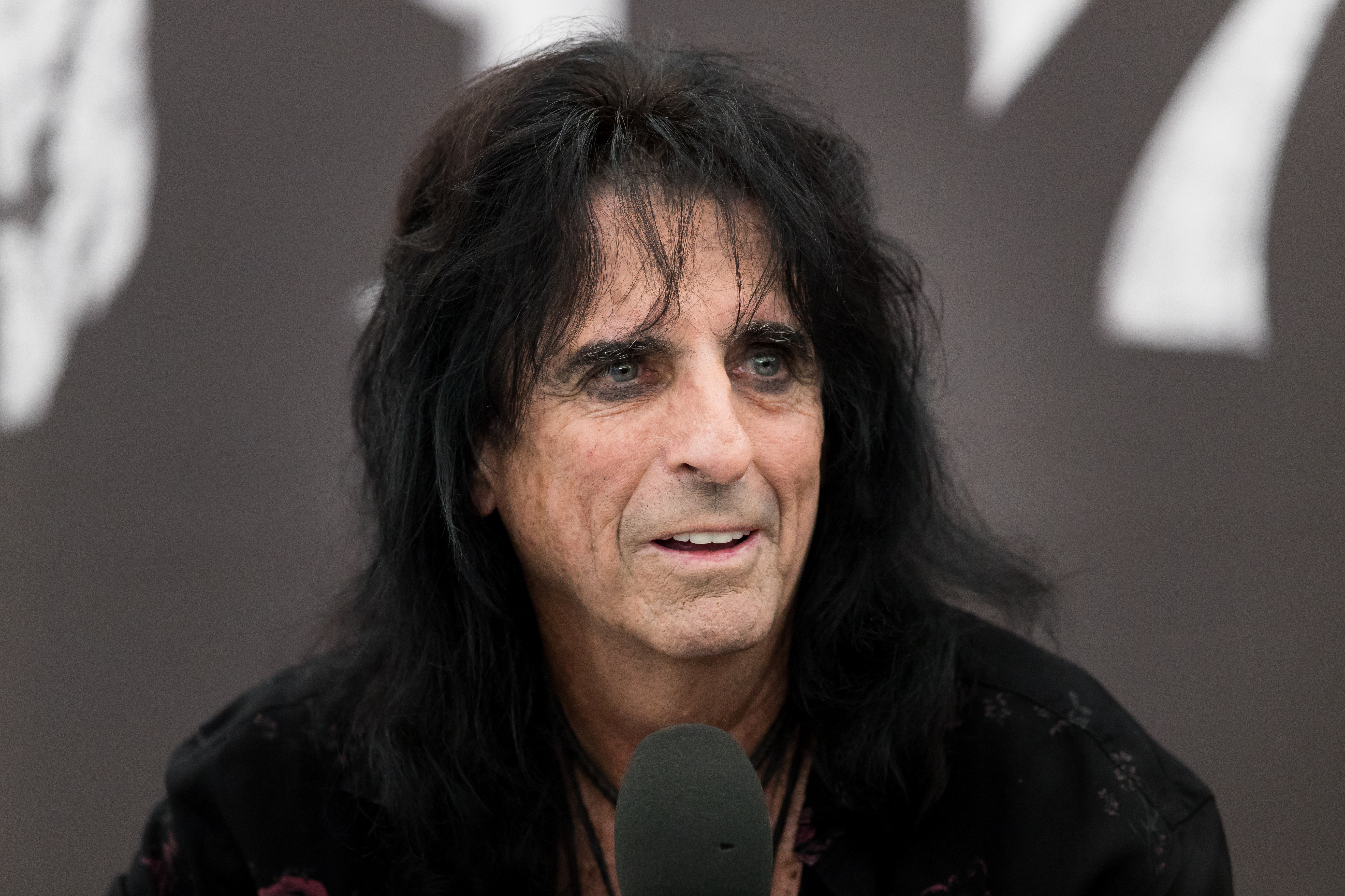 Alice Cooper during Wacken Open Air at Schleswig-Holstein, Wacken, , Germany on 2017-08-05, Photo: Sven Mandel